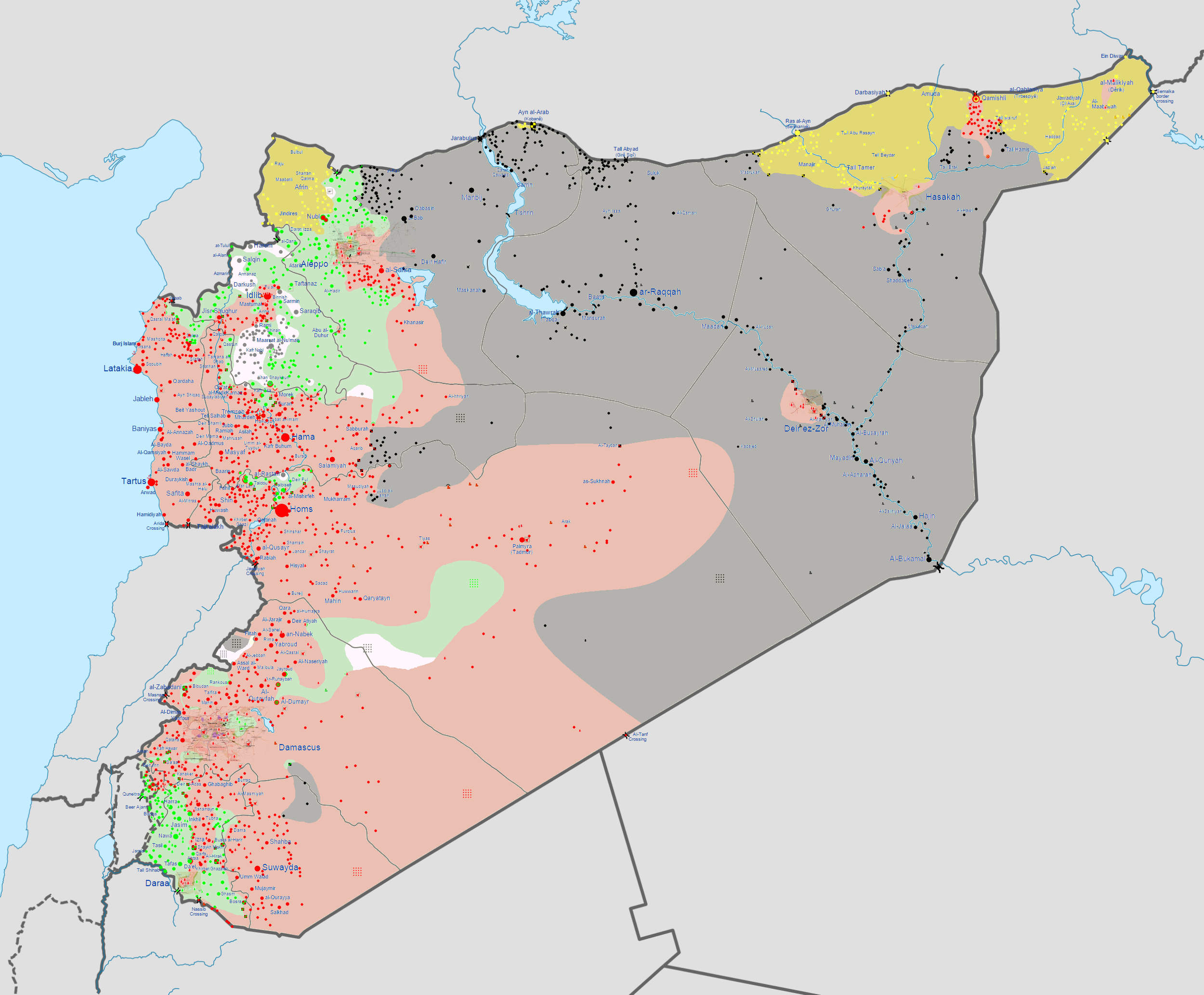 Guerre civile syrienne au 4 janvier 2015